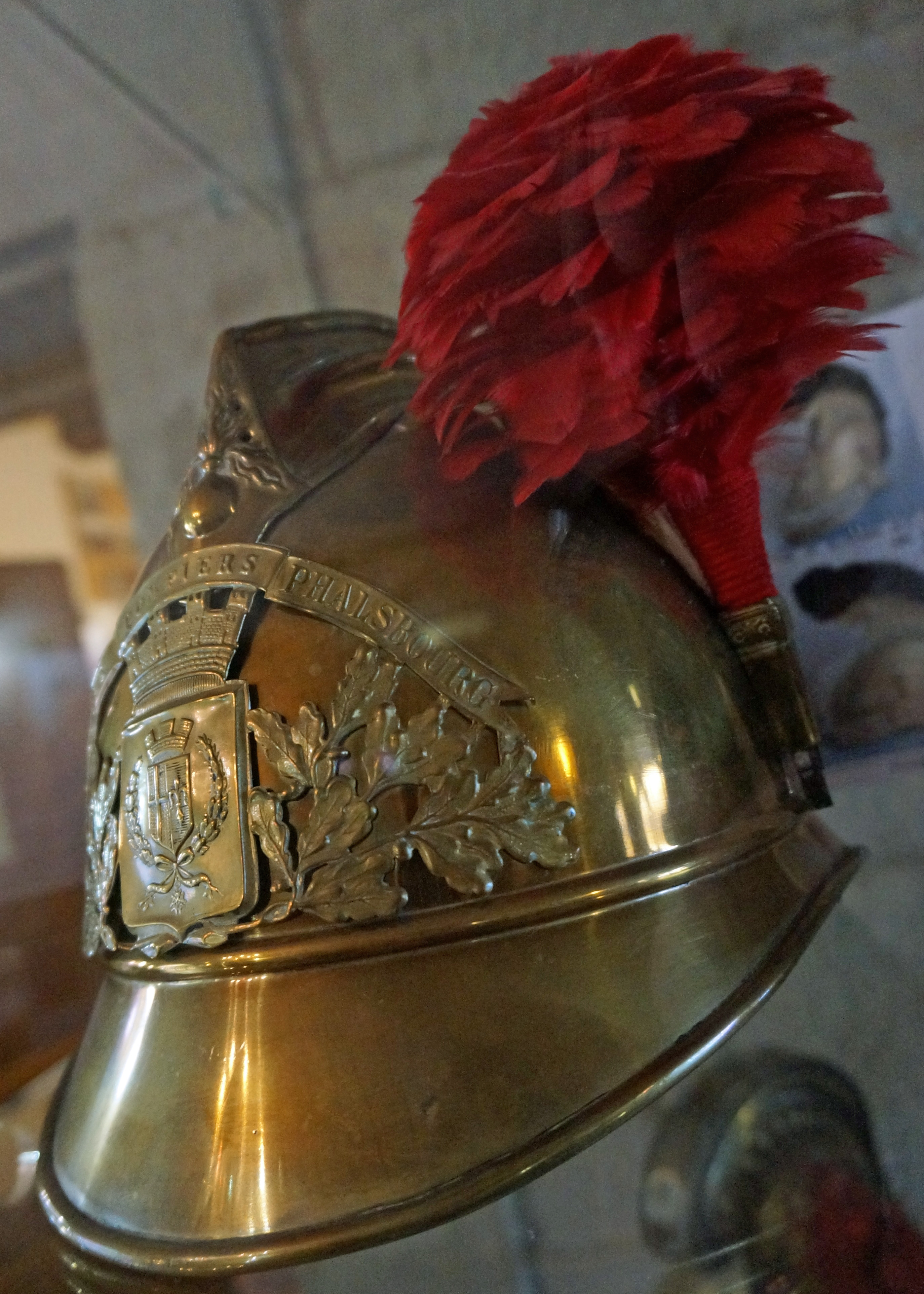 présenté en l'Hôtel de ville de Phalsbourg.